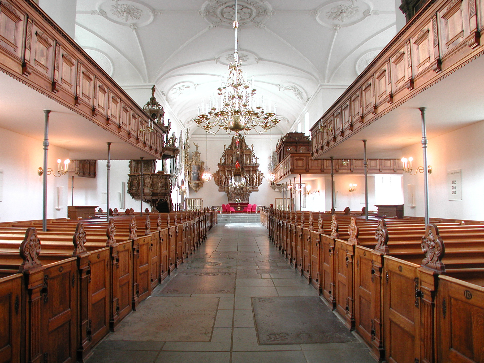 Holmens Kirke, Copenhagen, Denmark. Interior.